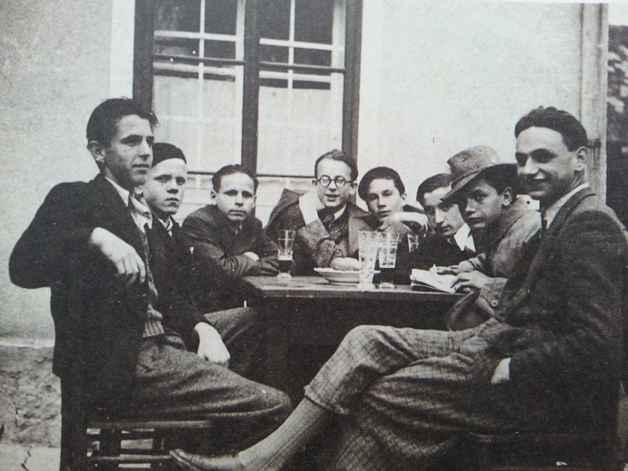 Drugi z desne je Alojzij Grozde v družbi svojih prijateljev in sošolcev na Klasični gimnaziji v Ljubljani